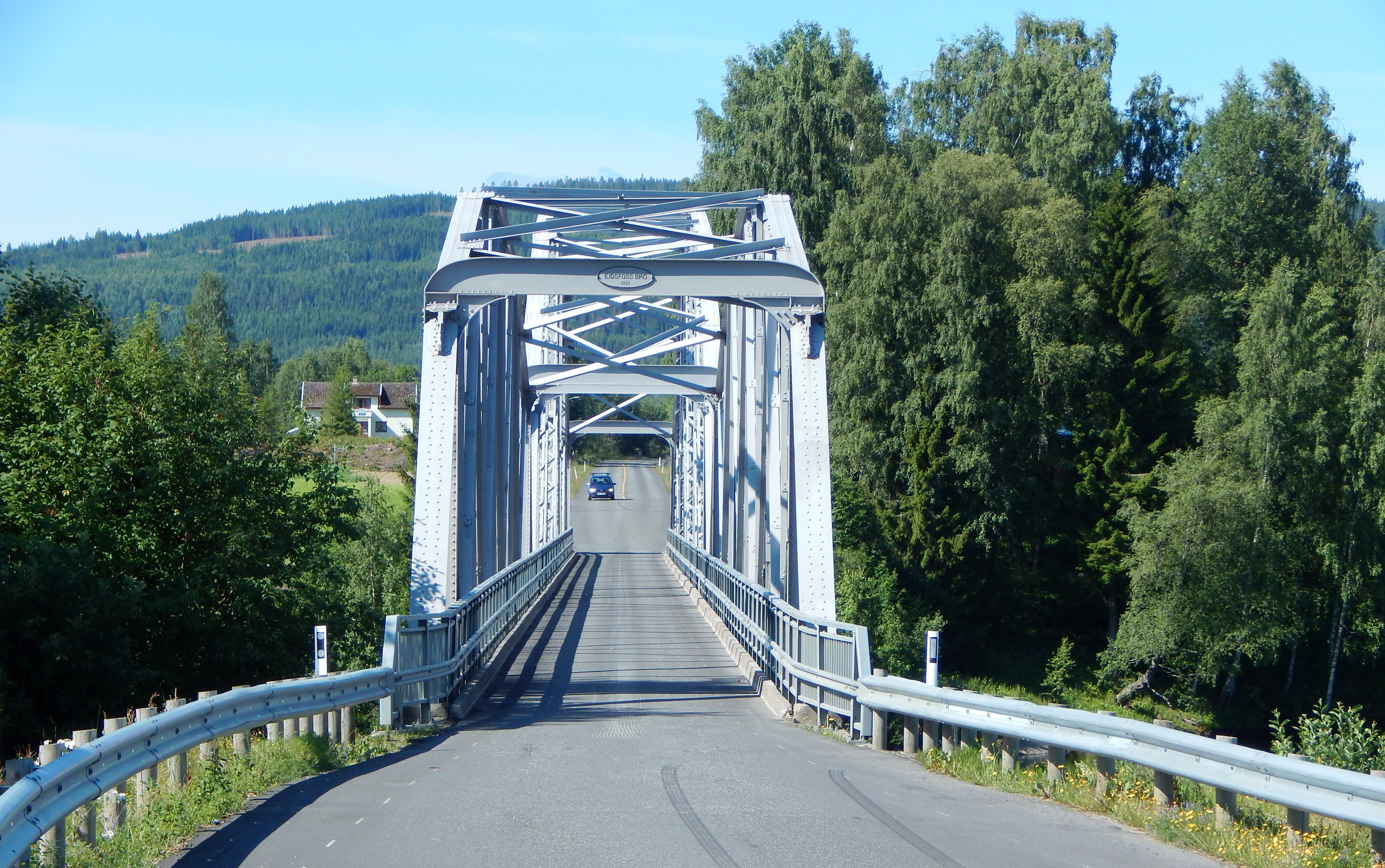 Eidsfoss bro fra 1921 (i dag kalt Eidsbrua) på primær fylkesvei 210 i Våler